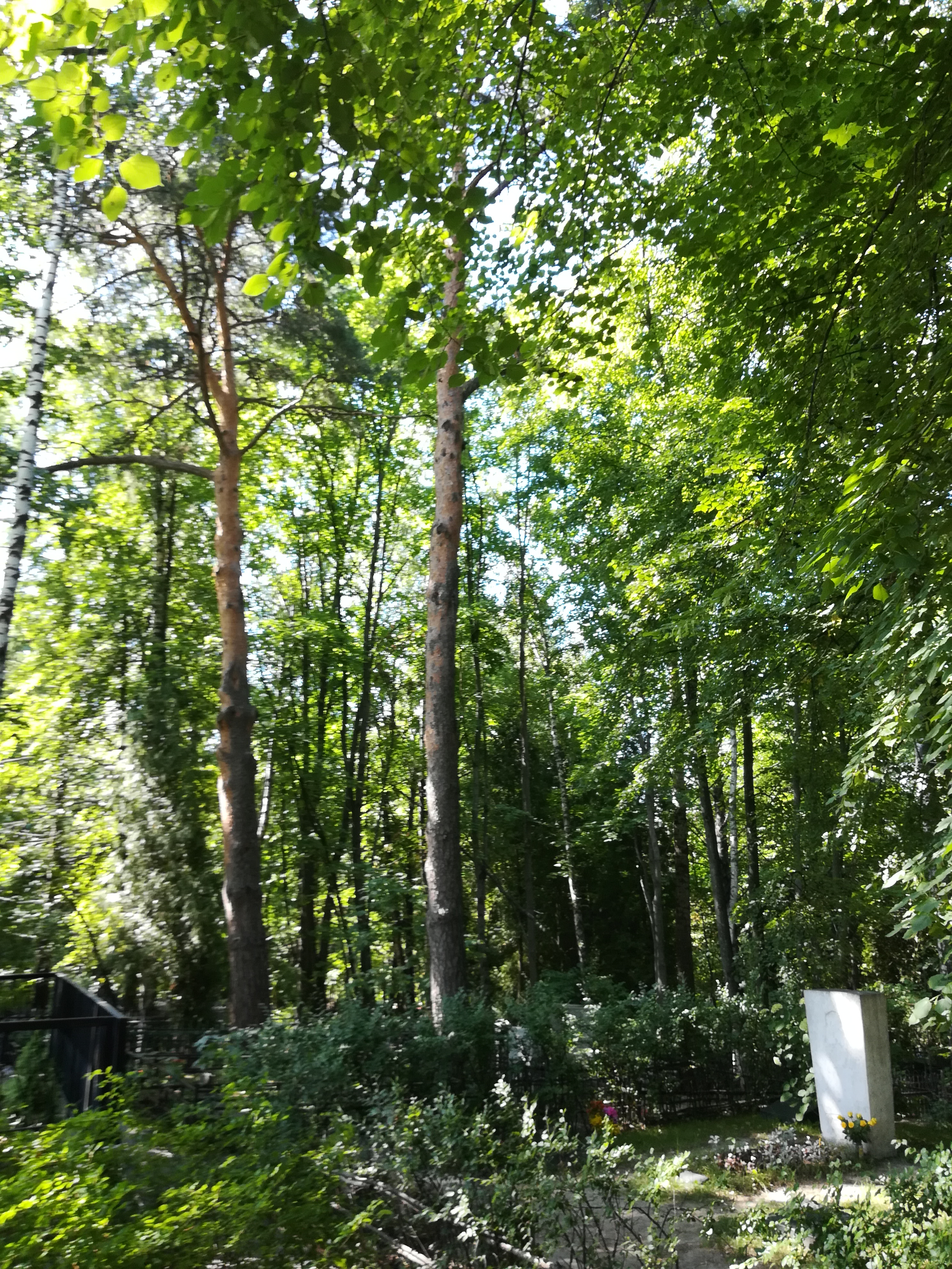 Могила Пастернака на Переделкинском кладбище